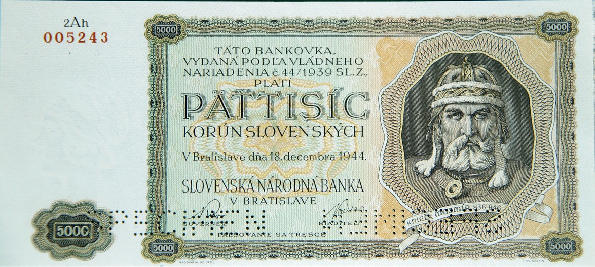 Mojmir I. auf einer Banknote des Slowakischen Staates (1944)